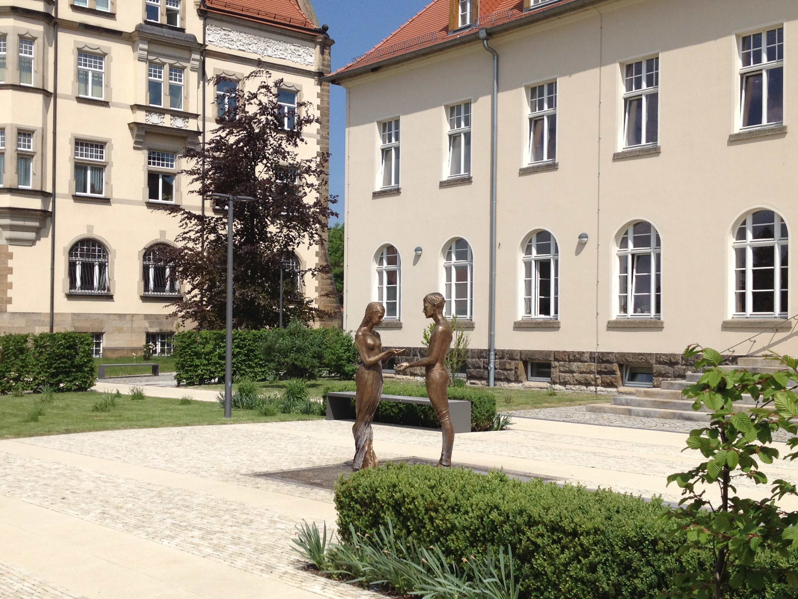 Radebeul Hochzeitsgarten Brunnenplastik „Liebespaar“ von Małgorzata Chodakowska